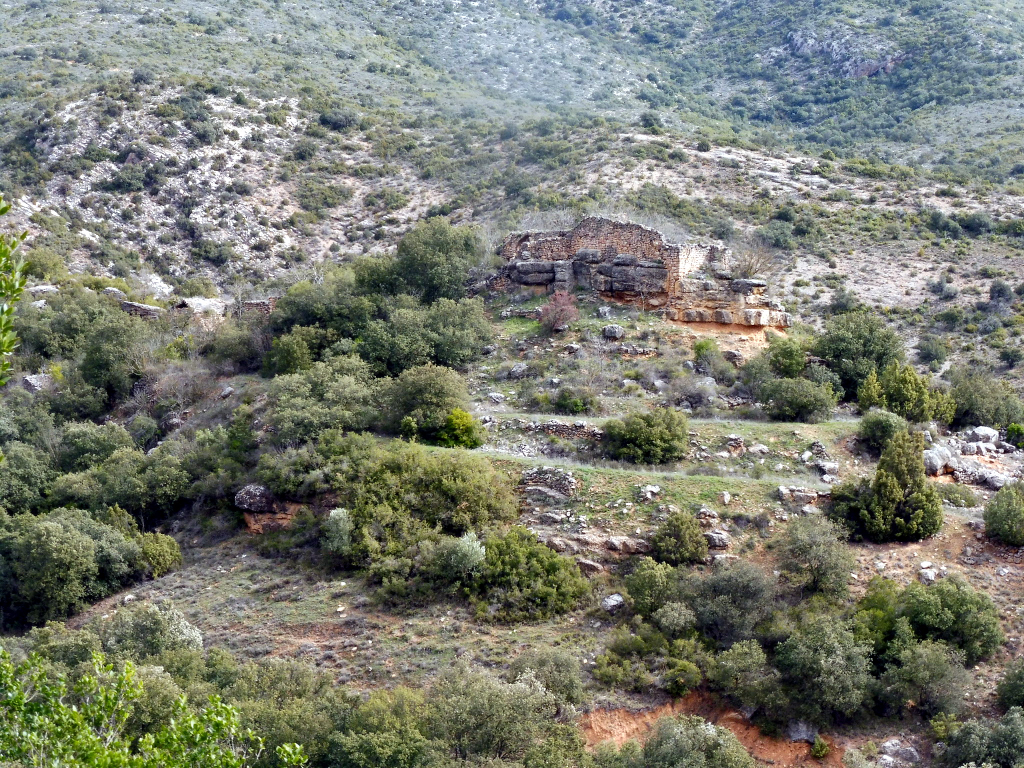 Església de San Martí de la Nou (Alòs de Balaguer): villarge de la Nou. L'església queda a l'esquerra